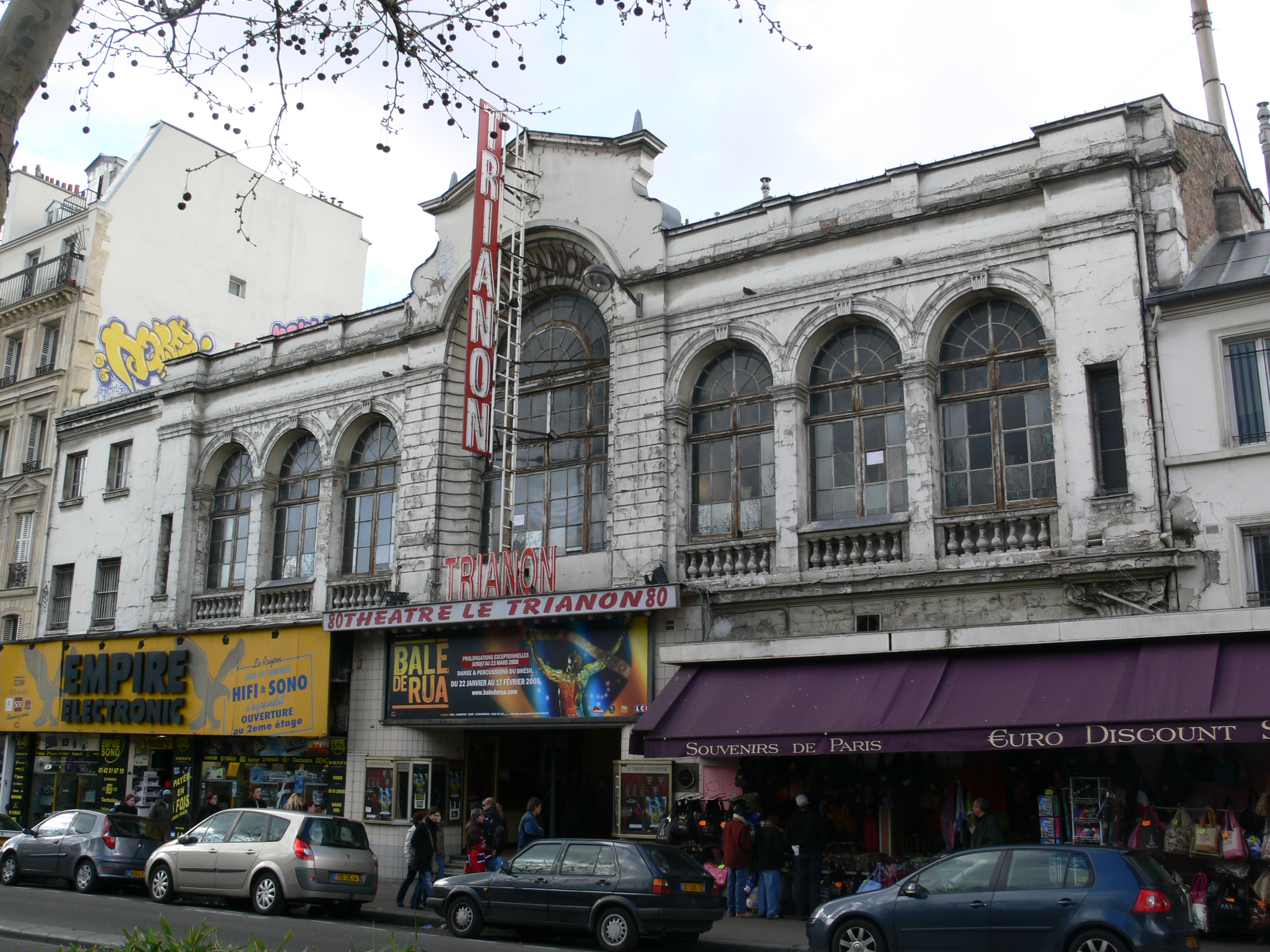 Le Trianon, 80 boulevard de Rochechouart, Paris XVIIIe, France